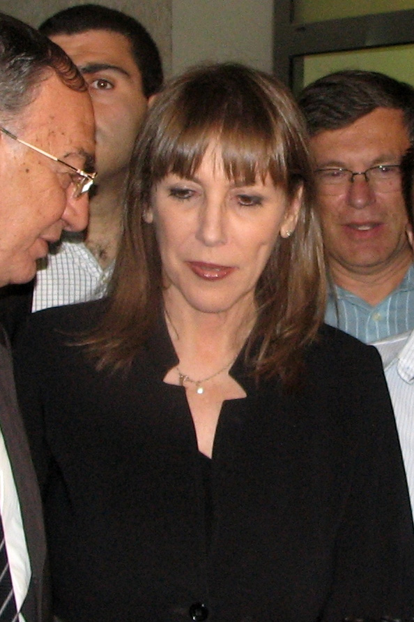 Nesher Limor Livnat at Country club opening in Nesher 29.4.2010 לימור לבנת בטקס פתיחת הקאנטרי קלאב בעיר נשר ביום 29.4.2010